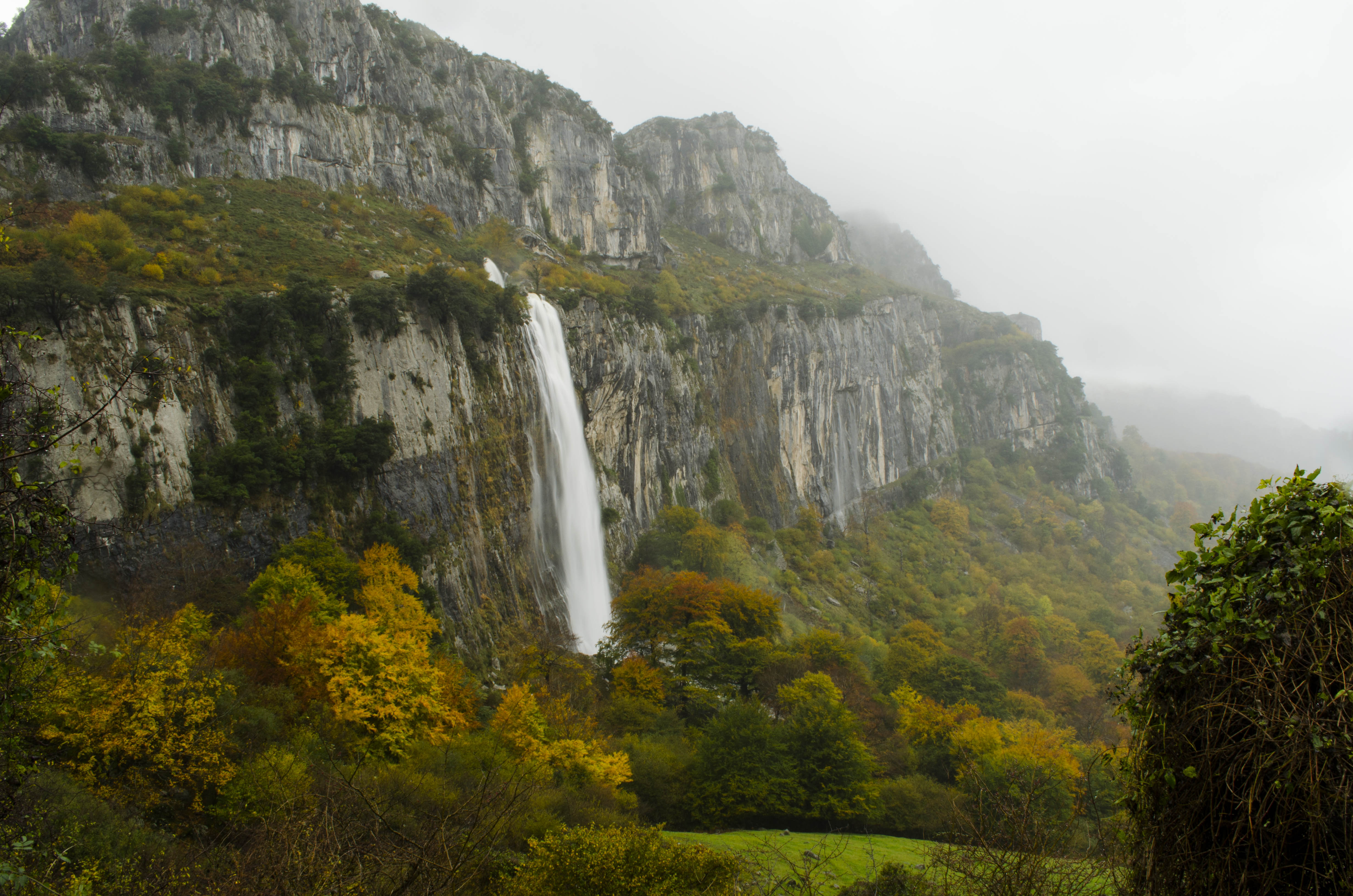 Brotando de una cueva se despeña el río Asón en su nacimiento